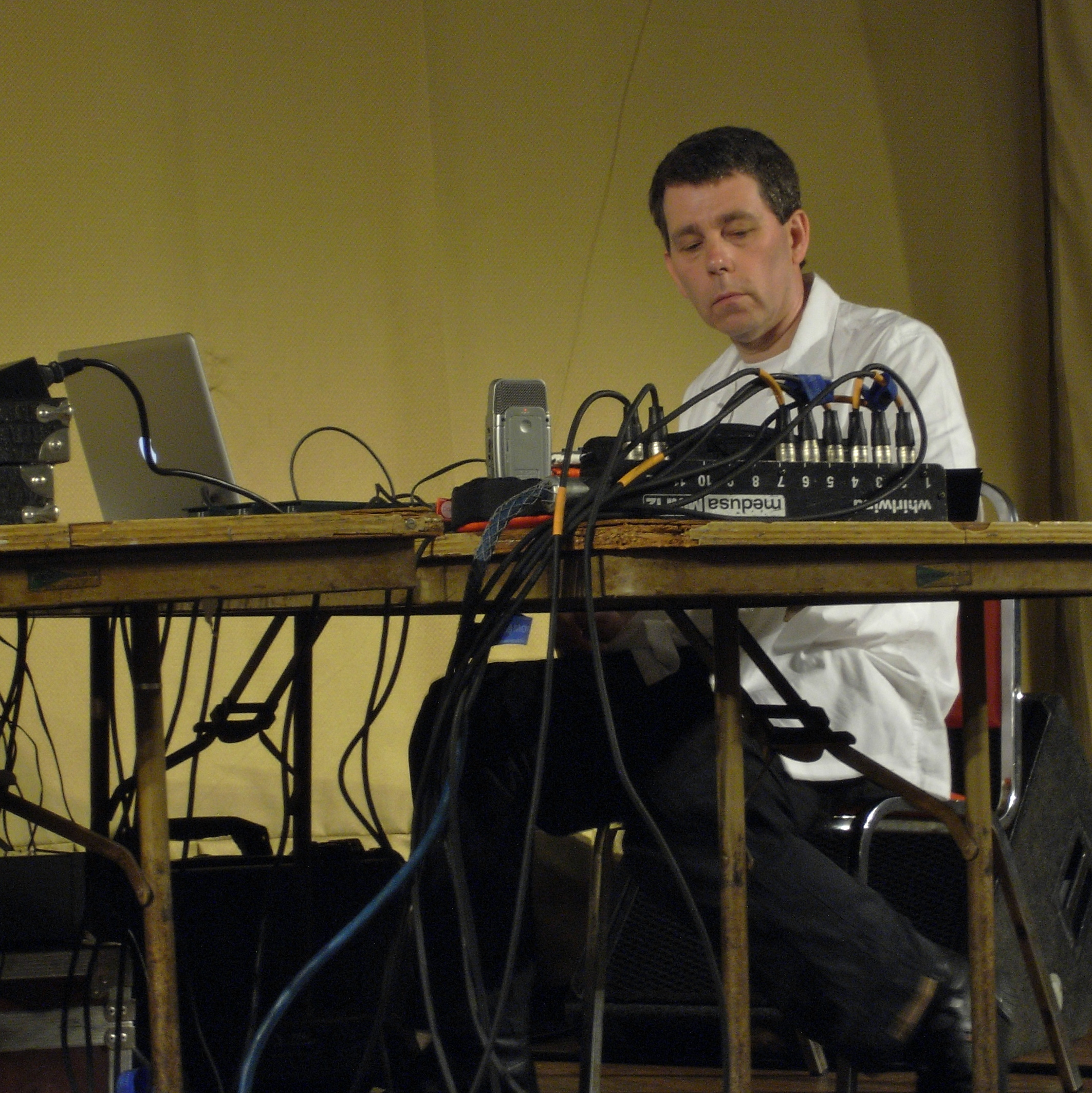 El programador Chris Carter, tocando con Throbbing Gristle en Nueva York. Foto del año 2009.